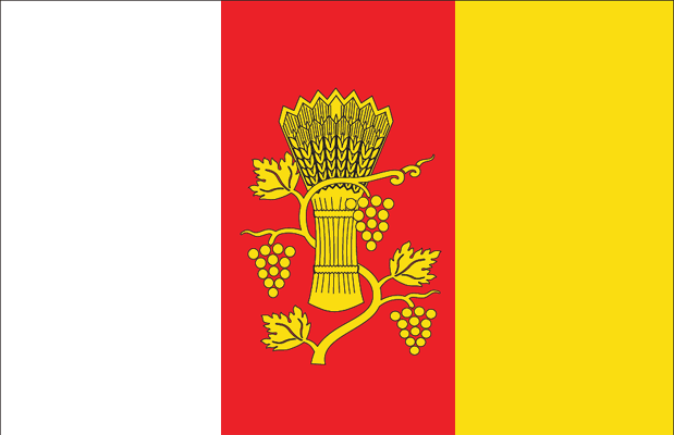 Прапор Білгород-Дністровського району